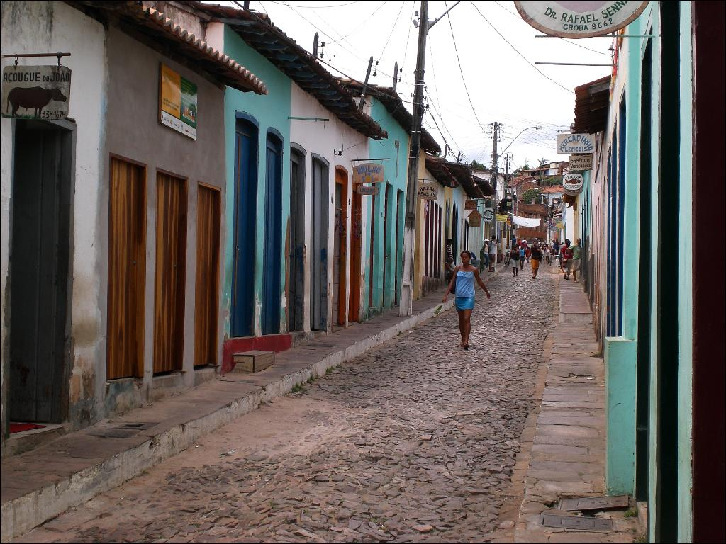 Rua na parte histórica de Lençóis, Bahia, Brasil.